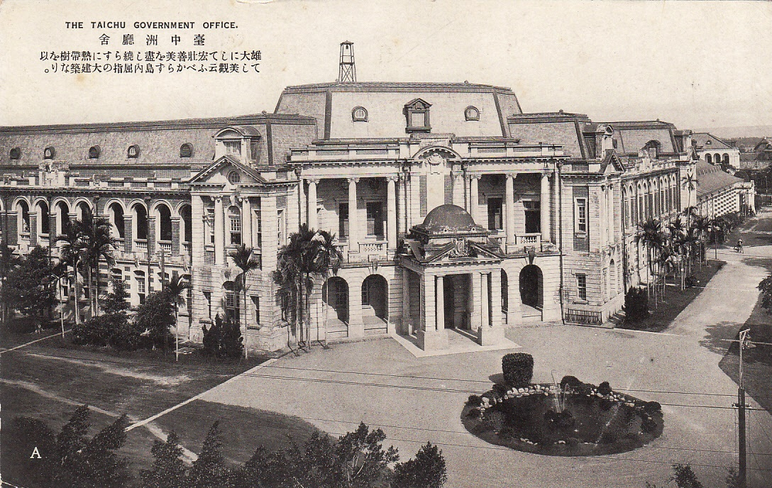 建成於1913年（日本大正二年）